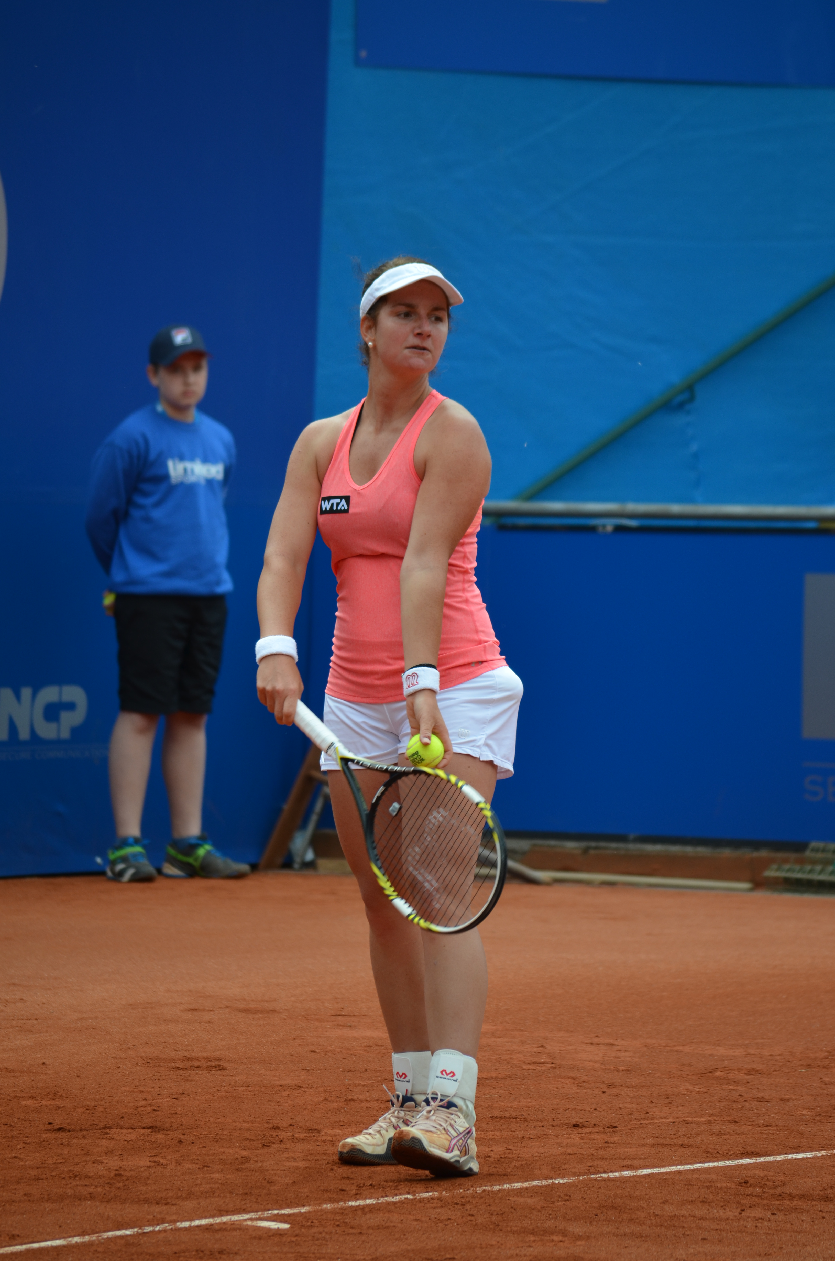 Melanie Klaffner bei der Erstrundenbegegnung der Qualifikation des Nürnberger Versicherungscup 2014